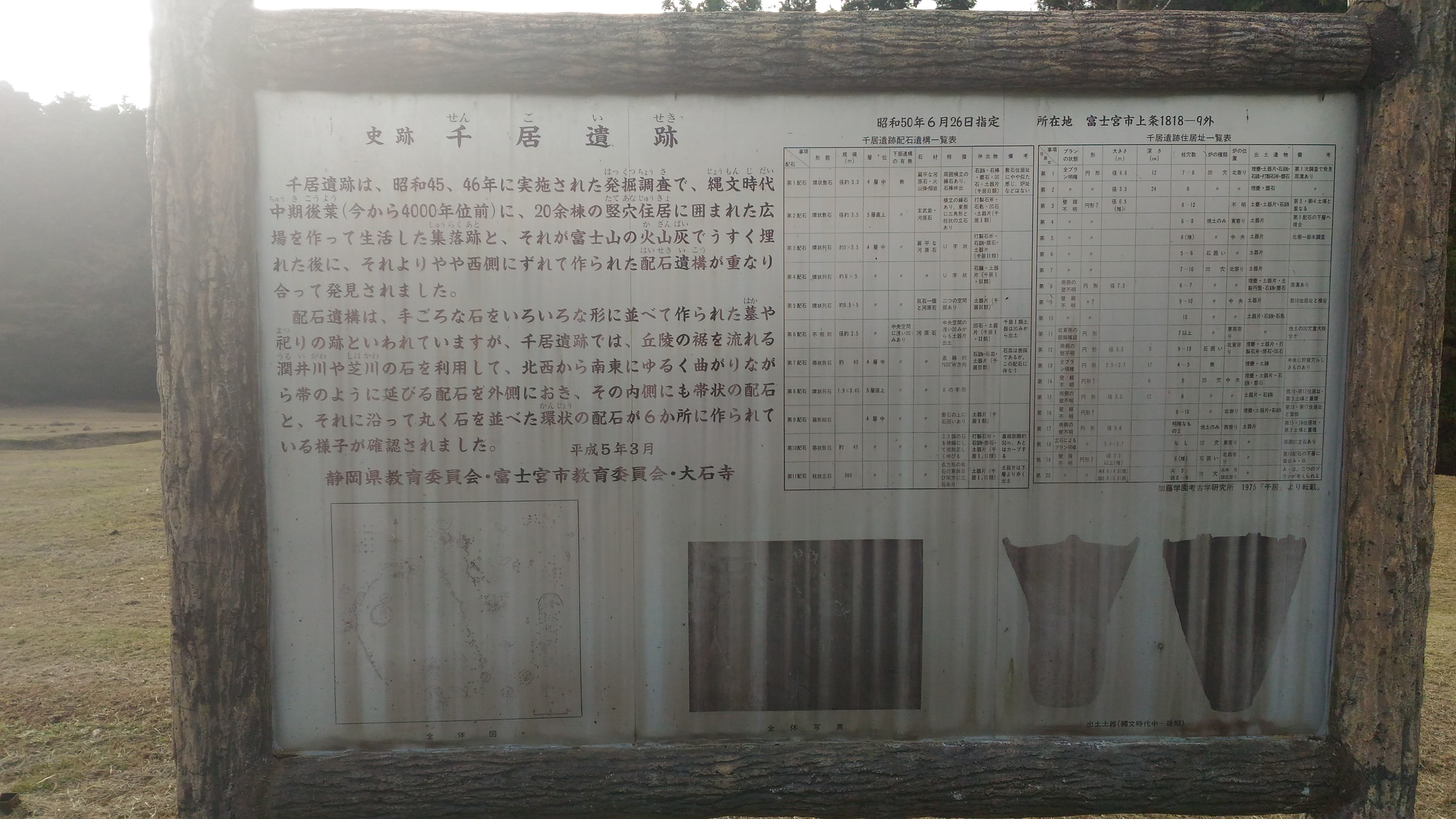 千居遺跡看板